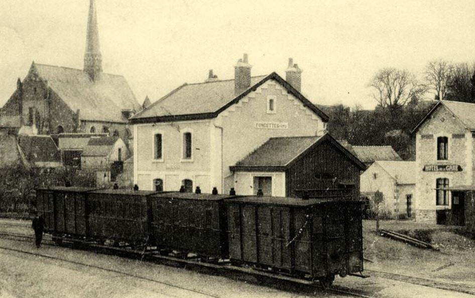 Gare, église et bâtiments urbains de Fondettes au début du XXe siècle.